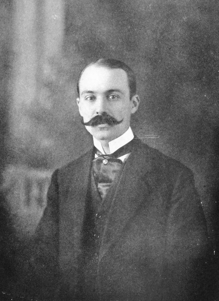 Ferdinand-Louis Le Cerf, amateur entomologist